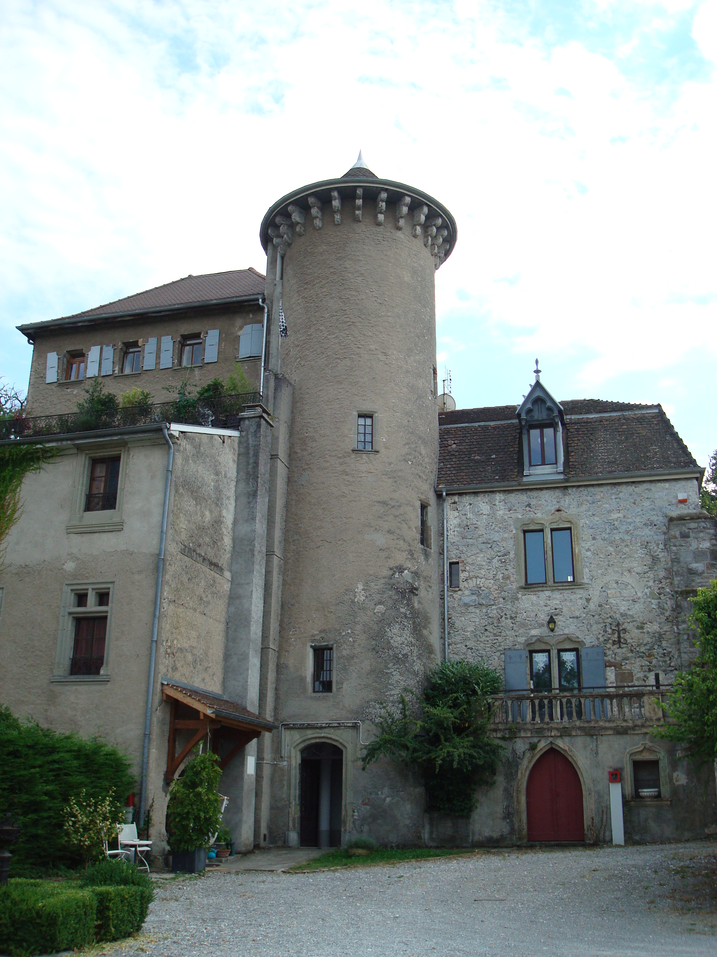 La maison forte vue depuis le sud.